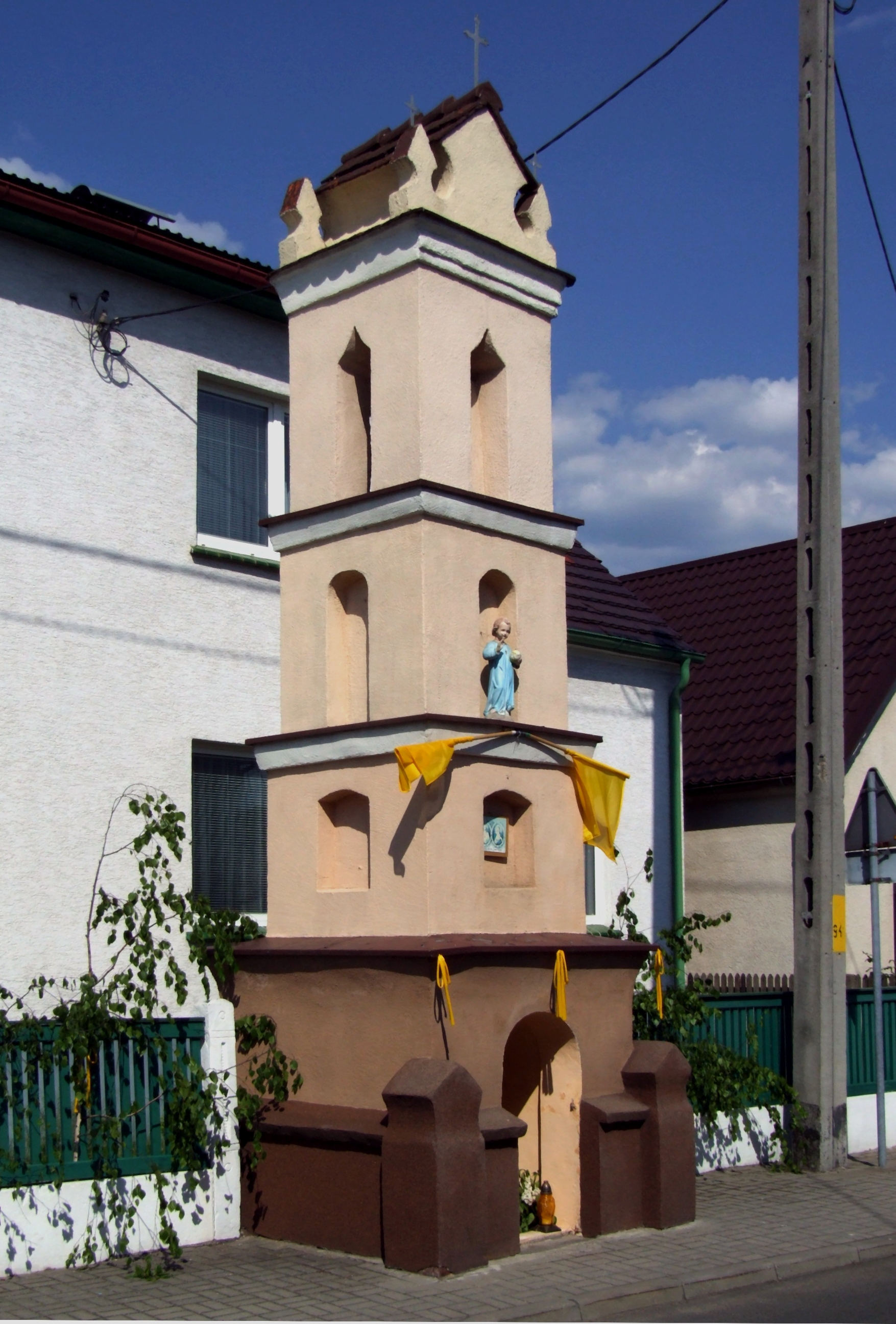 Kaple v Opolí